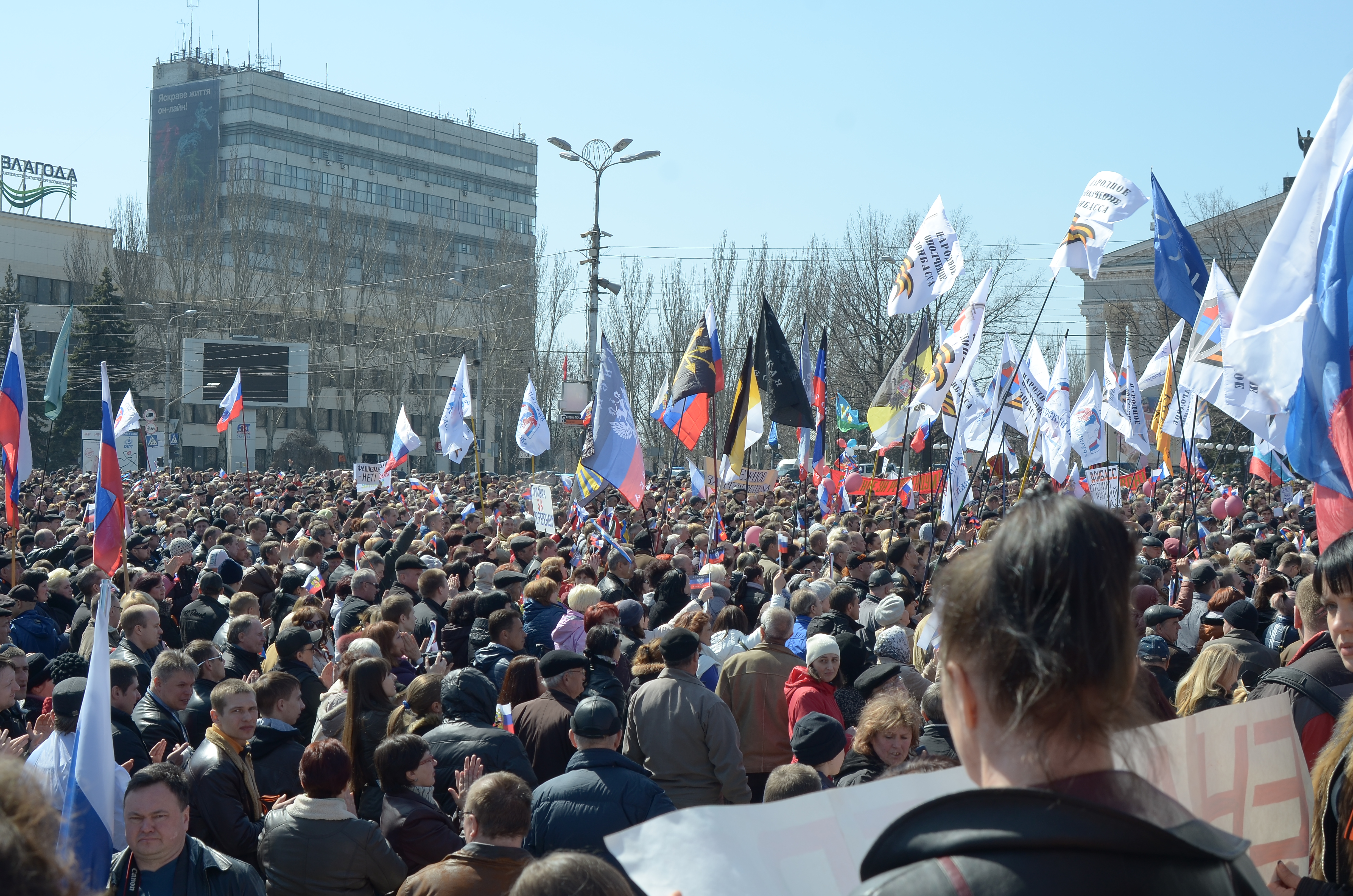 Протесты в Донецке